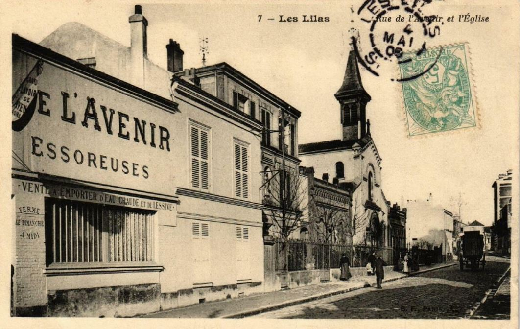 Les Lilas.Rue de l'Avenir.Église